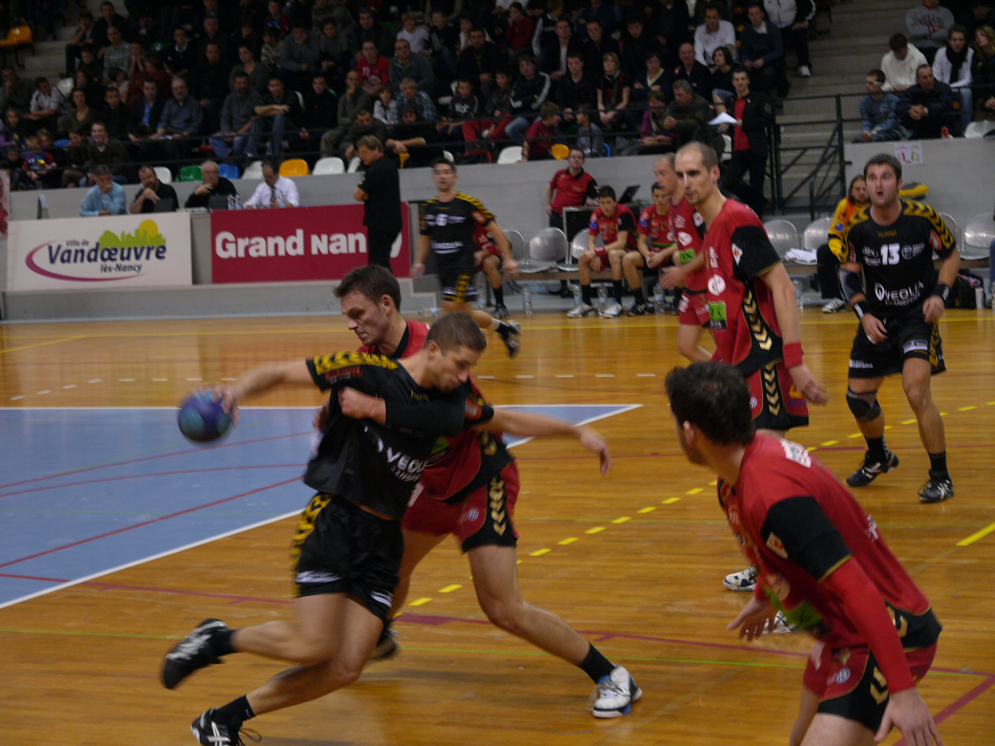 handball masculin championnat de france